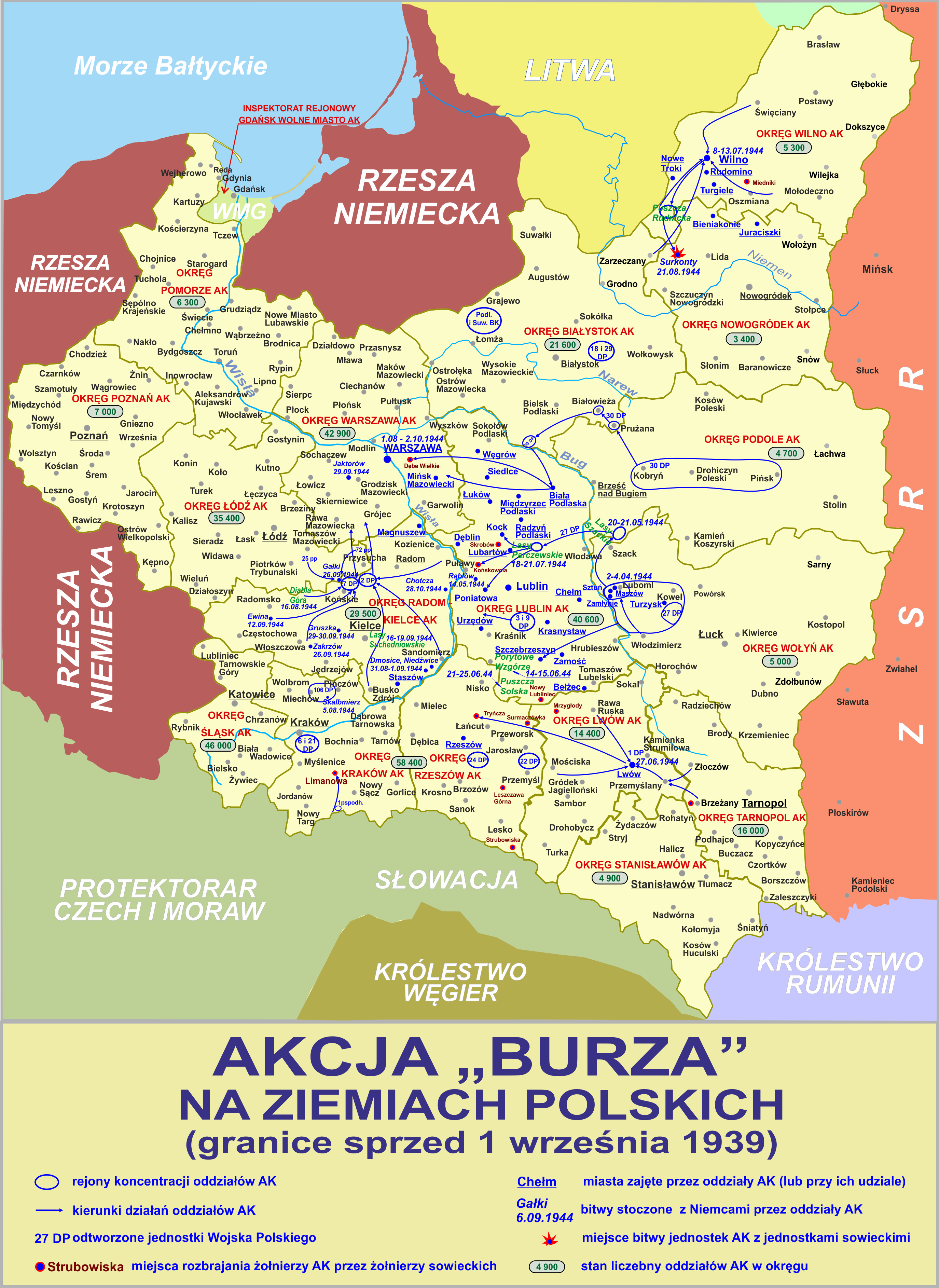 Tereny walk Armii Krajowej w czasie akcji "Burza" w 1944